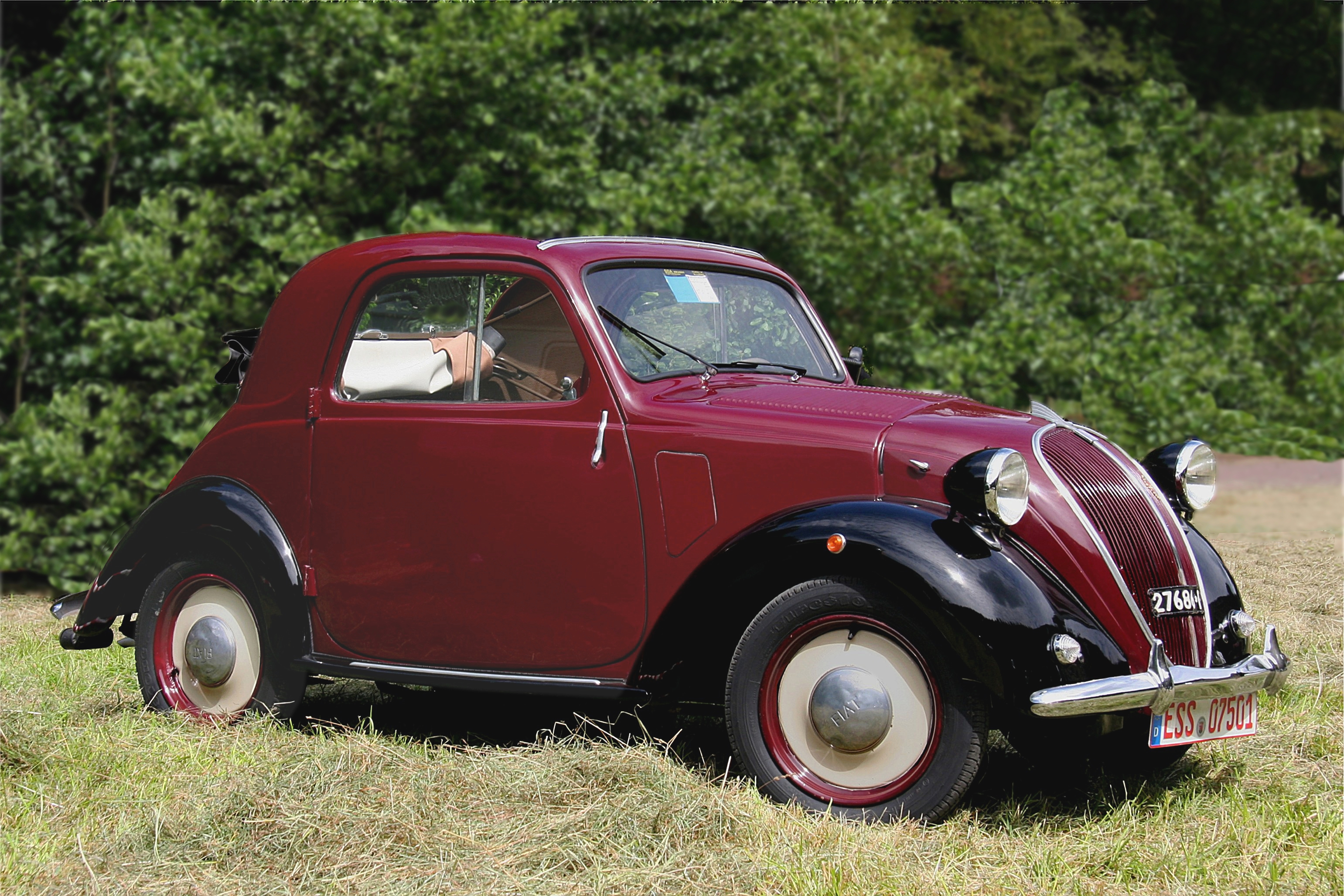 Fiat 500 B „Topolino“, Baujahr 1949 (Kennzeichen verändert). Das Auto wurde beim Oldtimertreffen in Vallendar fotografiert. Der Hintergrund ist ergänzt, um störende Absperrbänder und andere Fahrzeuge unsichtbar zu machen.